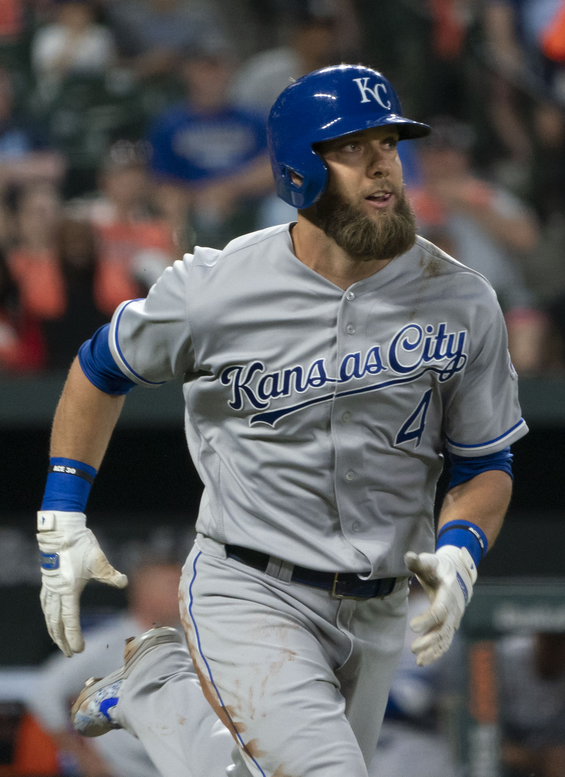 Royals at Orioles 5/9/18